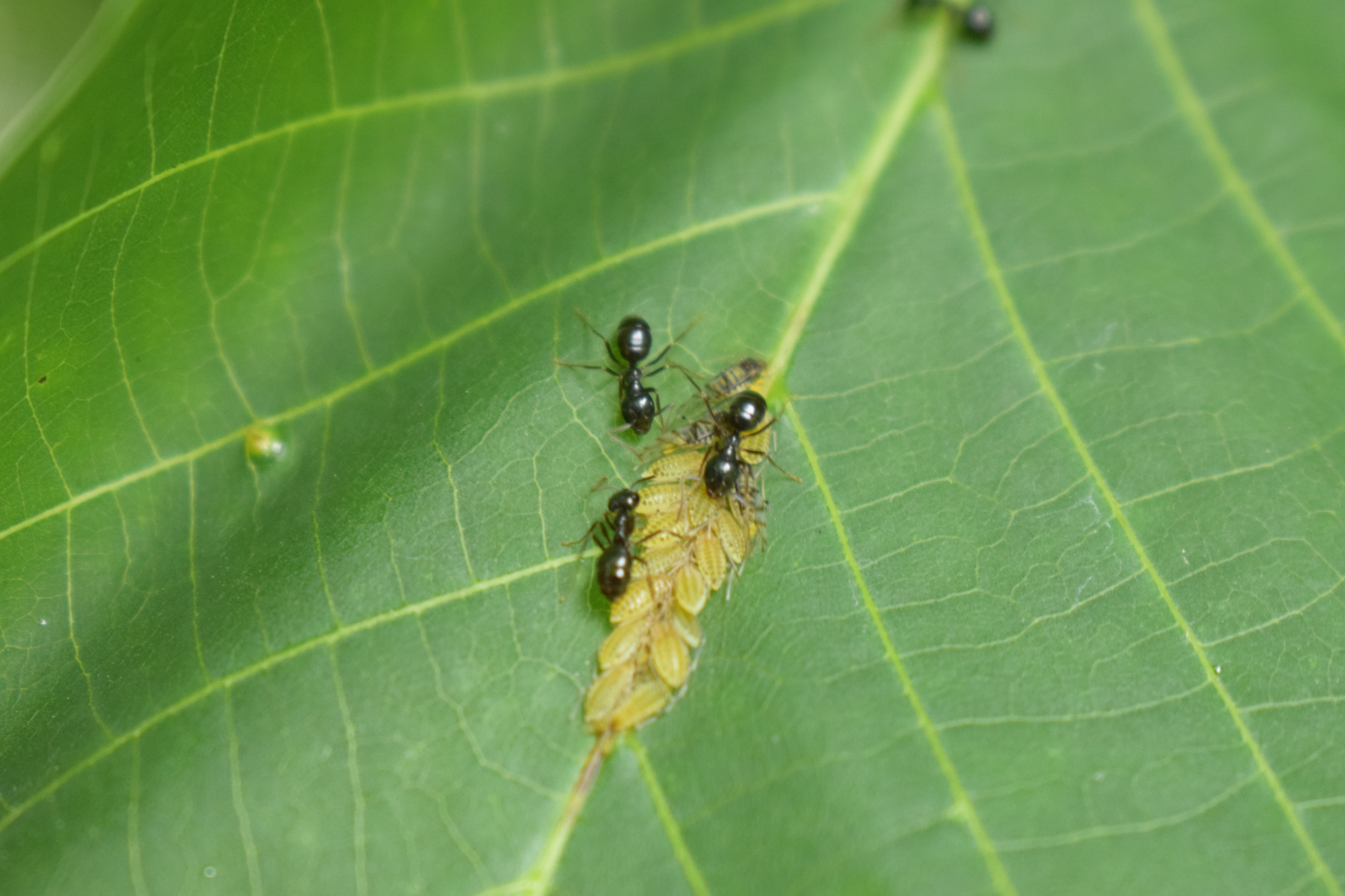 Lago di Santa Croce (Q49963632)